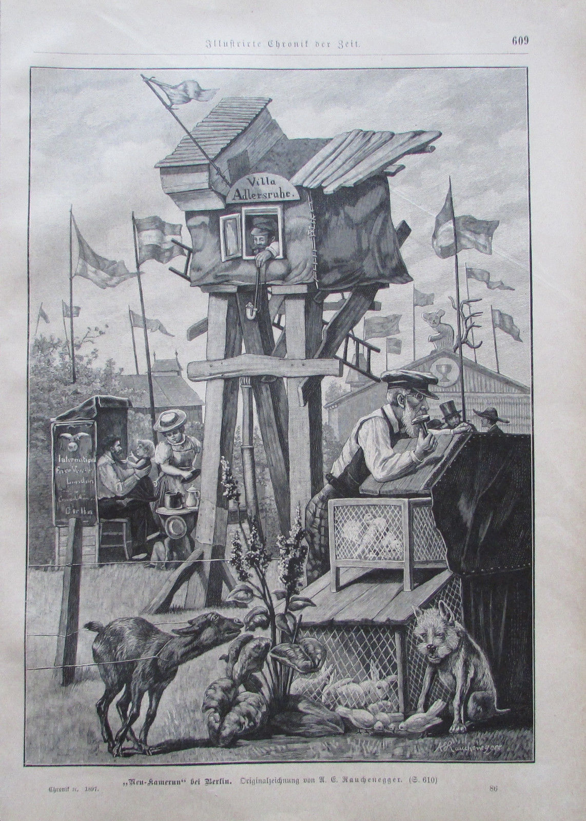 Neu-Kamerun bei Berlin von Alois Edgar Rauchenegger aus der "Illustrirten Chronik der Zeit" 1897